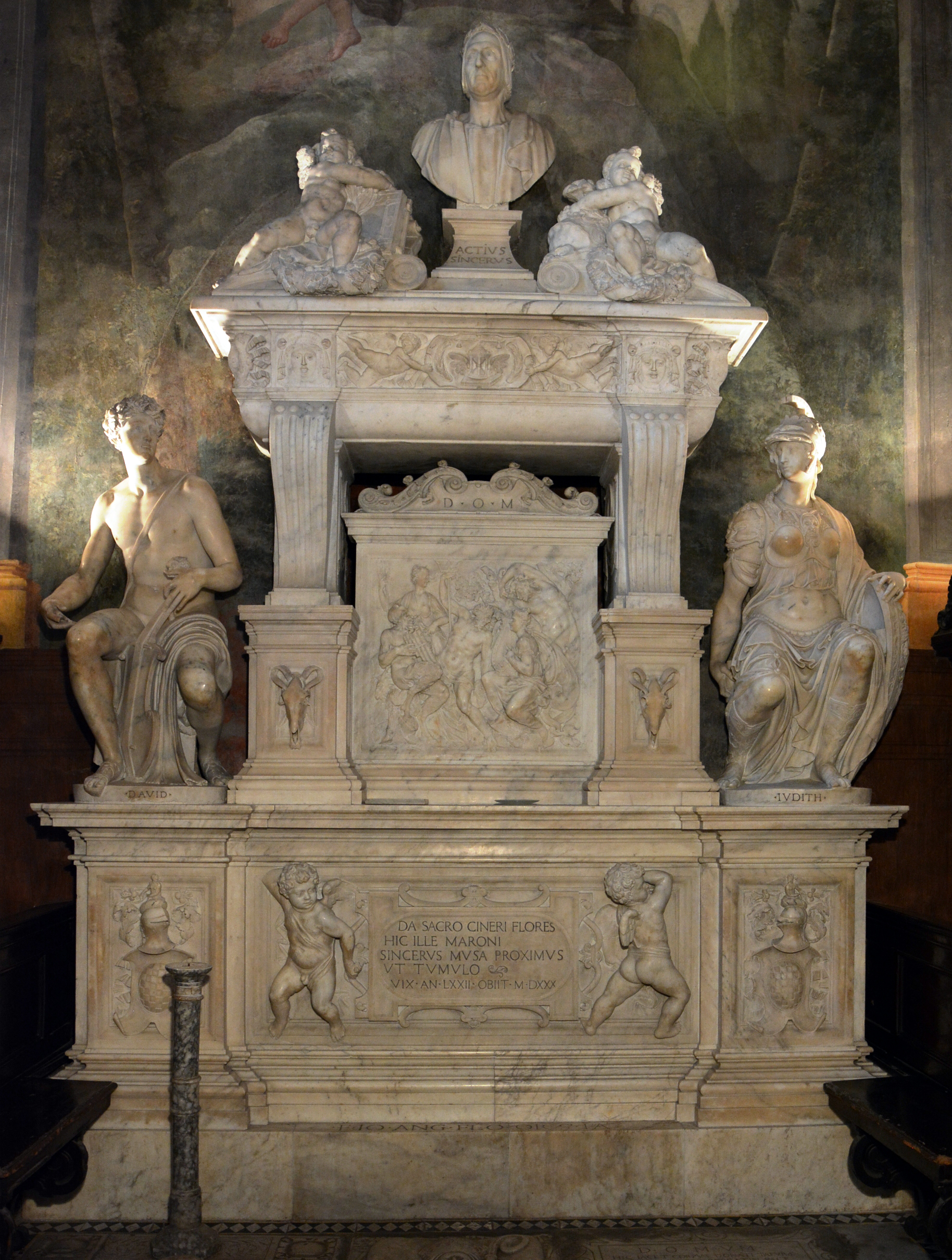 Tomba Sannazzaro, Napoli